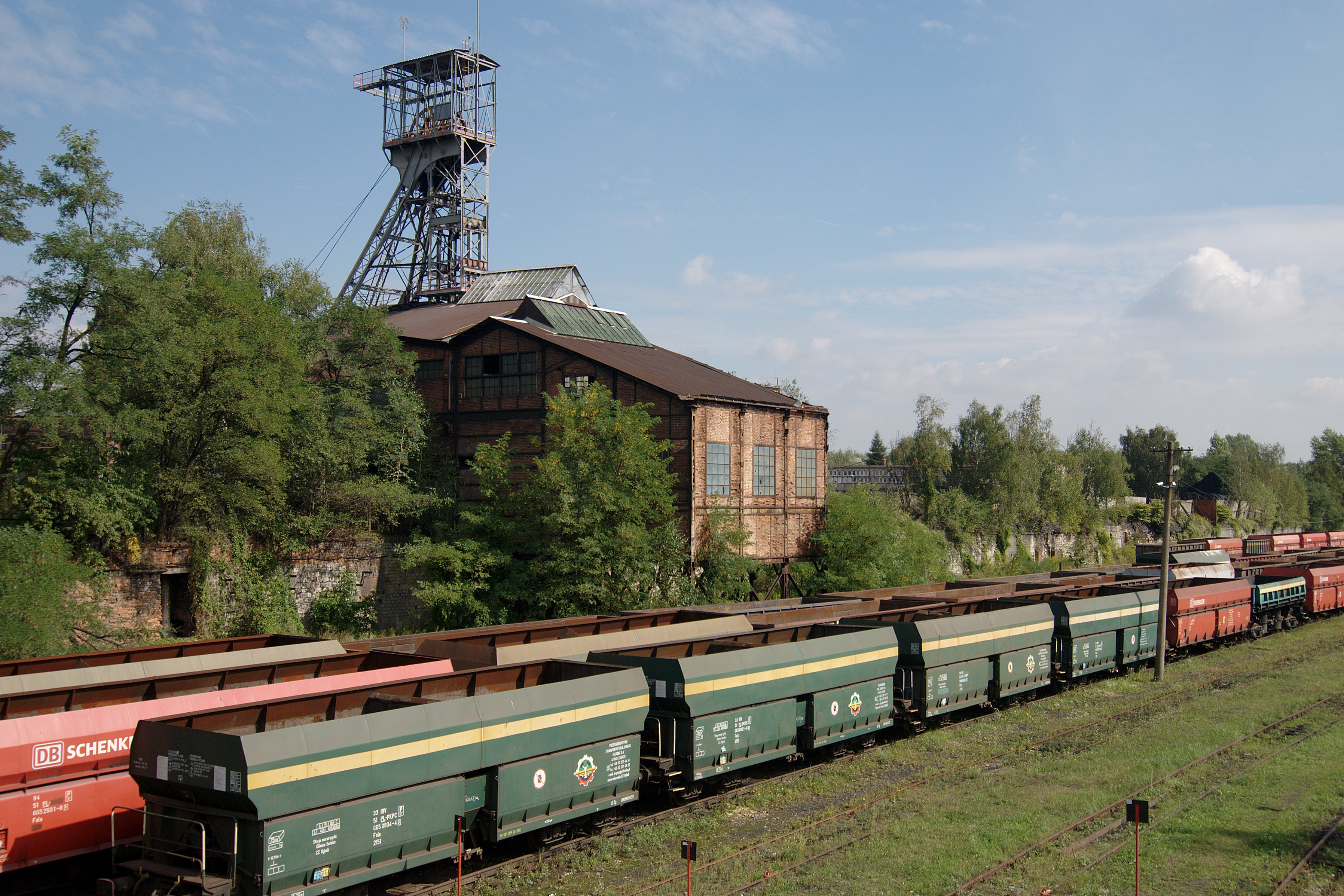 Zabrze. Ulica Szybowa. Szyb Staszic.